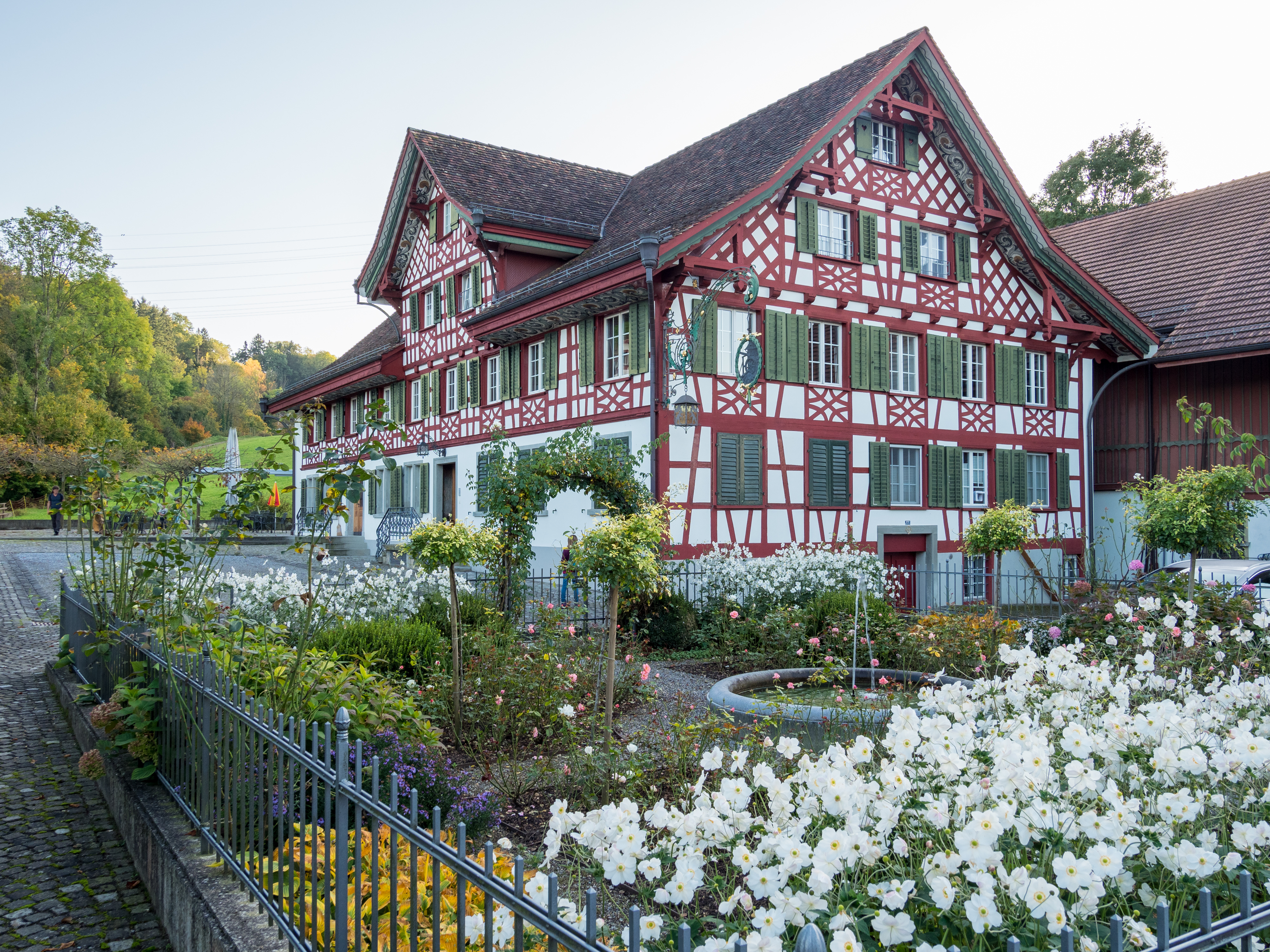 Wohnhaus Obermühle